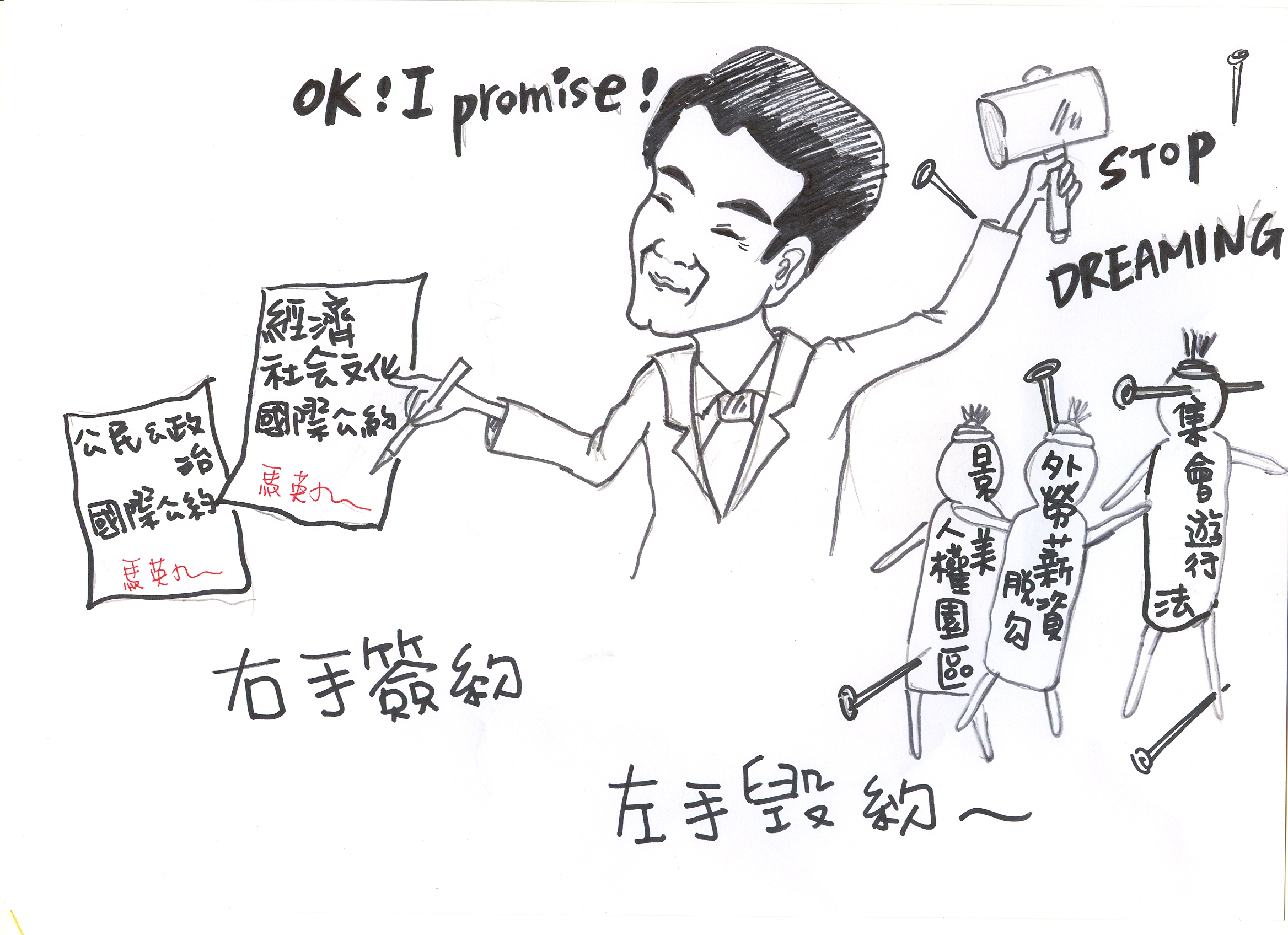 2009年5月，野草莓學運支持者諷刺中華民國總統馬英九讓台灣人權倒退的政治漫畫。2016年7月18日，國立臺灣大學工會成員高若有諷刺，中華民國總統蔡英文執政後，在《集會遊行法》修法議題上，民主進步黨延續了中國國民黨的意志、繼續實踐「無限期支持禁制區，無限期支持強制排除」，野草莓學運期間蔡英文簽署的「人權永久保固書」看來就要到期了。